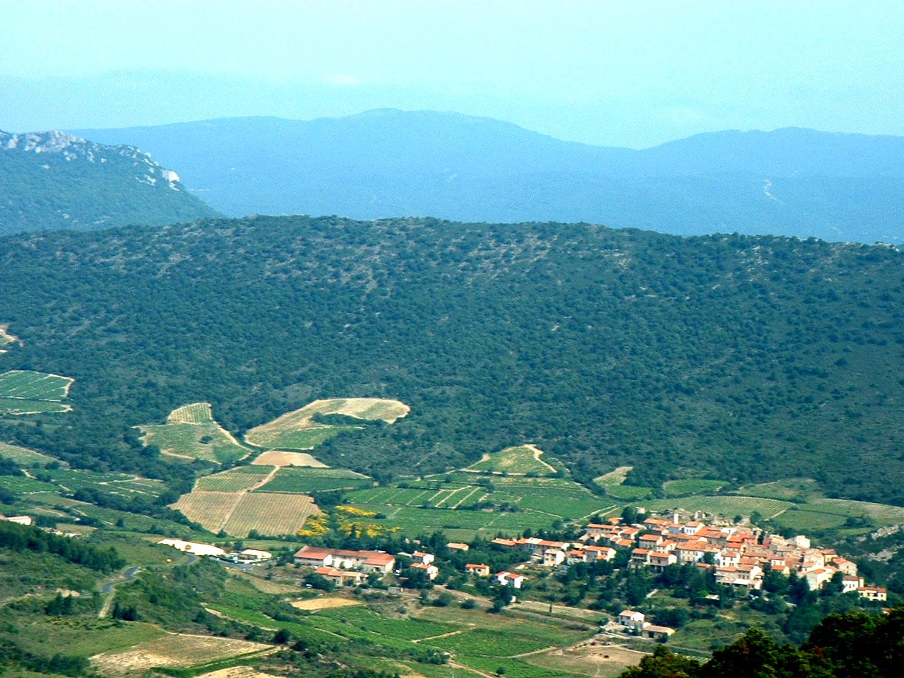 Vue du village de Paziols avec en fond le Mont Tauch